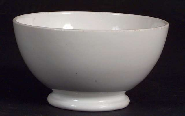 Spilkum stemplet: EGERSUNDS FAYANSEFABRIKS Co/8. Høyde 7,6 cm